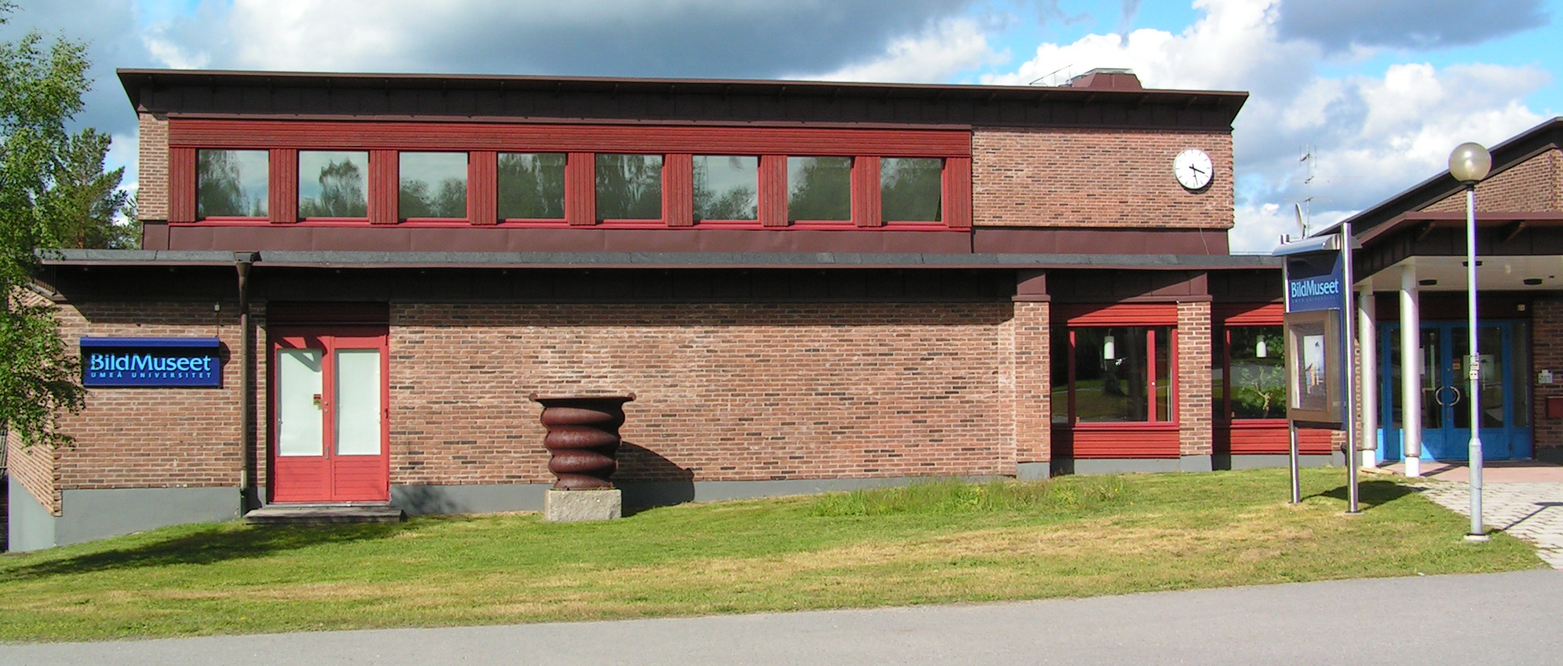 BildMuseet, Umeå, Sweden